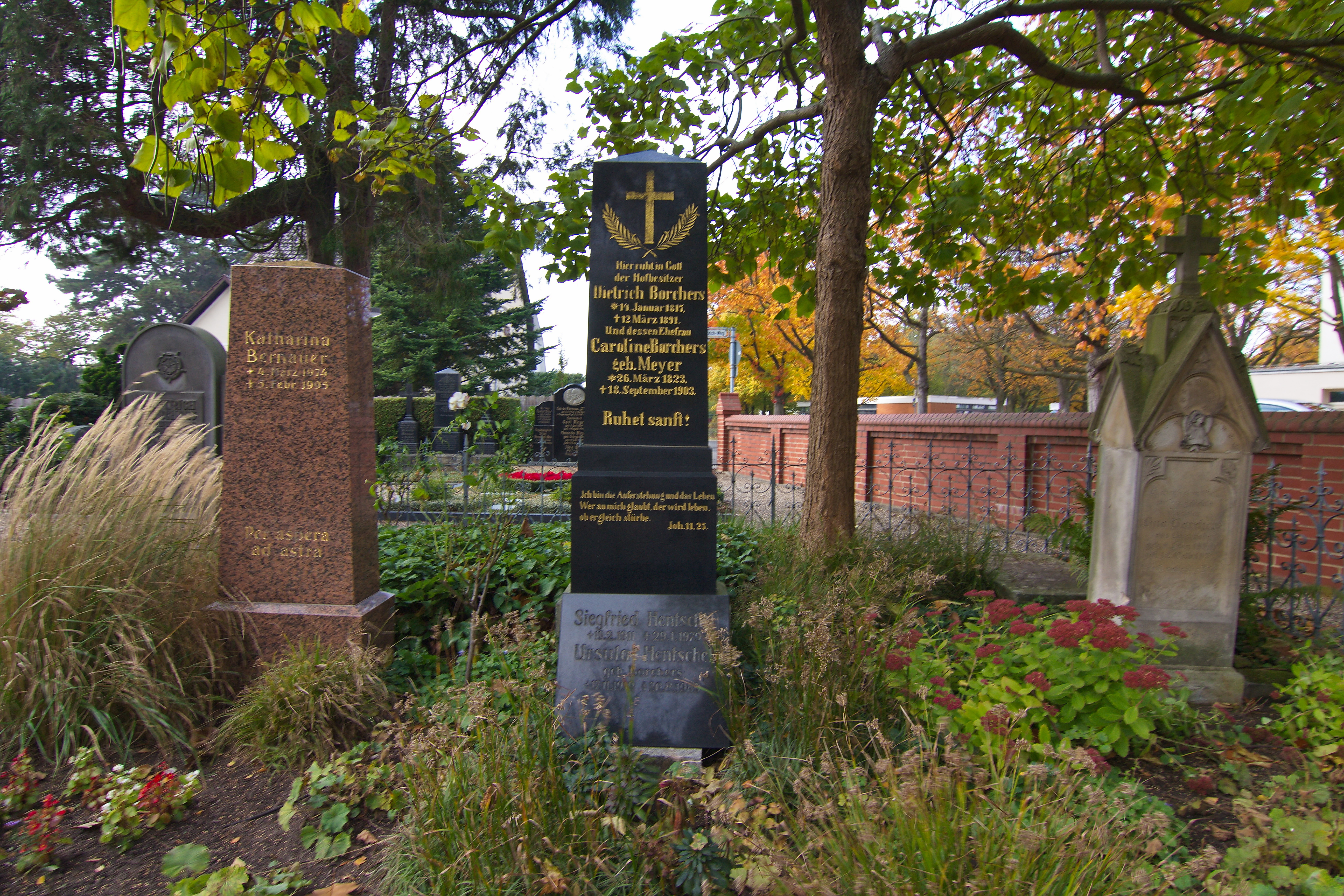 Friedhof der Jakobikirche am Kleinen Hillen in Kirchrode (Hannover), Niedersachsen, Deutschland